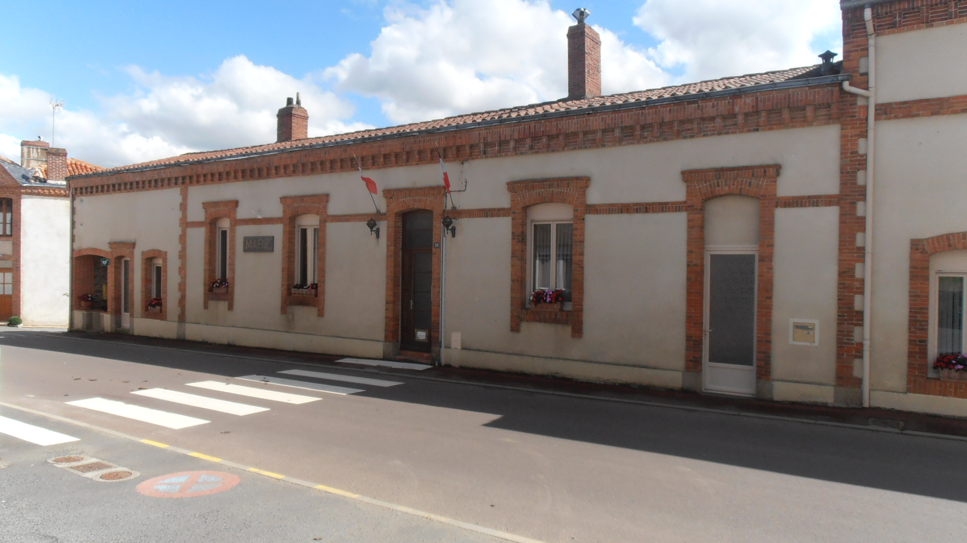 La mairie de Saint-Rémy-en-Mauges (Maine-et-Loire, France).